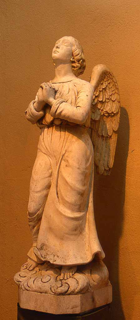 Ángel orante, de Mateo Inurria. Escultura que se encuentra en el Museo Arqueológico Municipal de Montoro, primera obra documentada del escultor. Obra de juventud que le fue encargada por el arquitecto Amadeo Rodríguez para la hornacina de la fachada del Cementerio de Montoro.